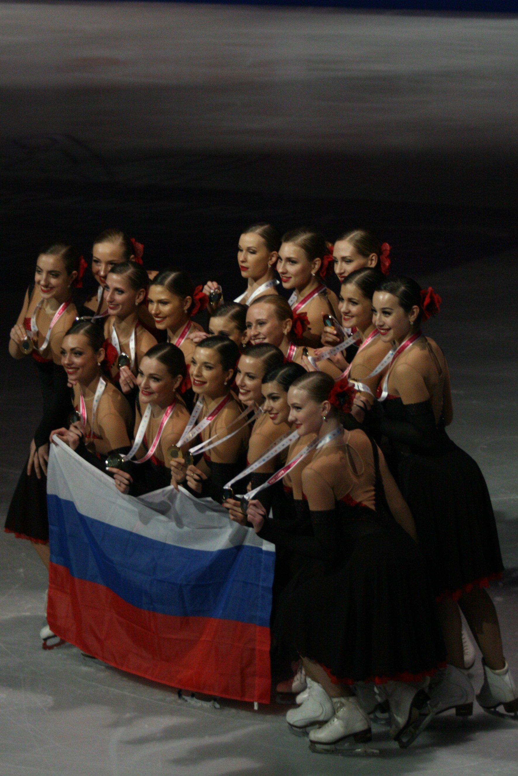 Команда Paradise (Россия) - первое место на финале Гран-при по фигурному катанию 2015-2016.